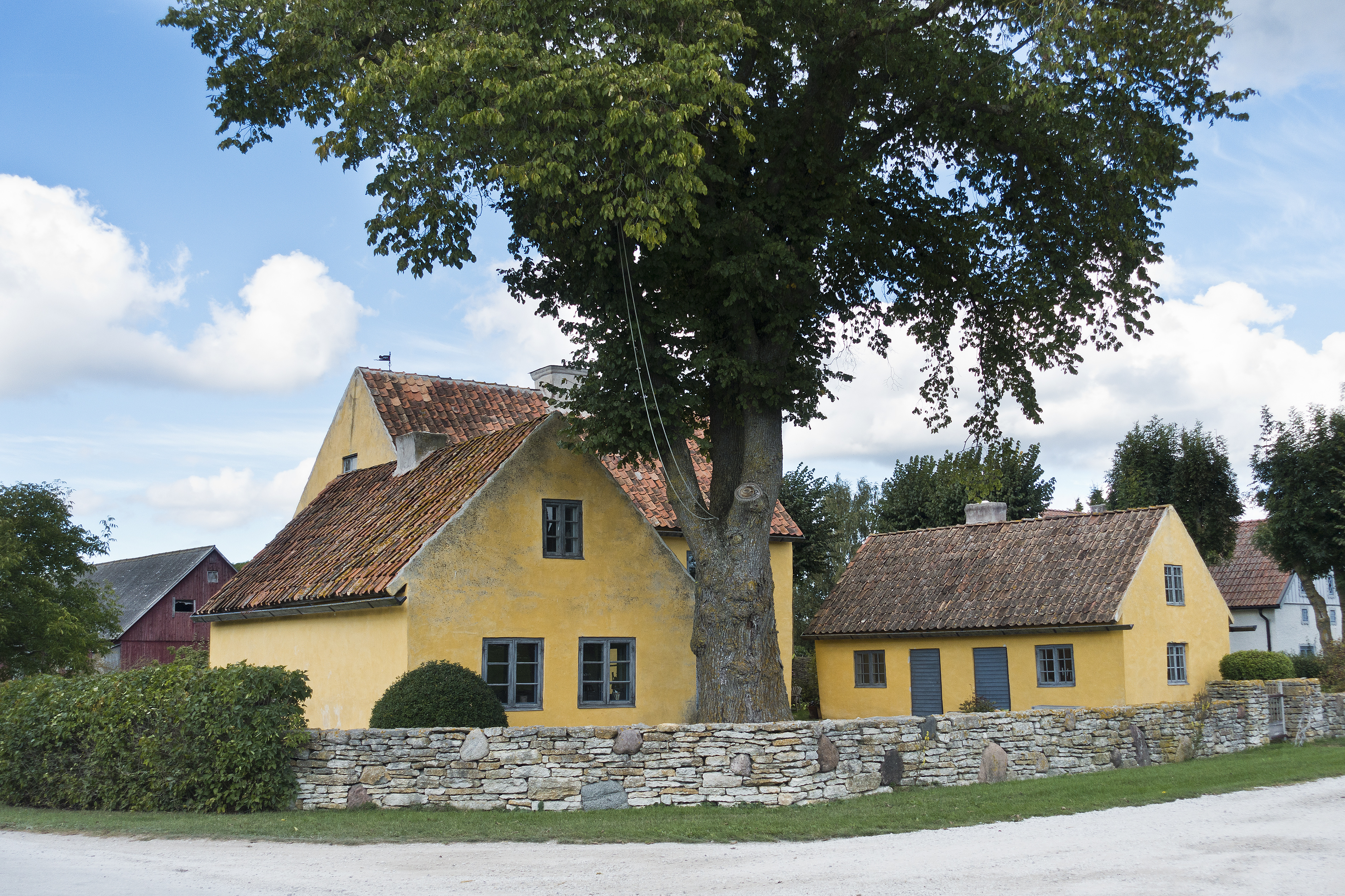 BebR: Manbyggnadens första våning uppfördes i kalksten under slutet av 1600-talet eller början av 1700-talet. Under 1800-talets början tillkom en andra våning. Byggnaden tillhör öns äldre tvåvånings enkelstugor. Under första hälften av 1900-talet tillkom ett bakbygge i trä. Byggnaden har en slätstruken gul puts med gråblå snickerier samt tegeltak. Byggnaden har genomgått ett flertal ombyggnader och renoveringar, men har en bevarad rumsindelning i den äldre delen, vilken sannolikt representerar det tidiga 1800-talet.